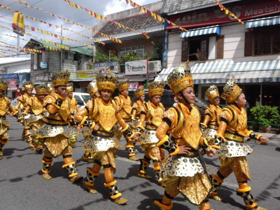 Winaray : Iguinpapakita ngadi an pag-api han Buyogan Festival han guindumara nga Pintados Kasadyaan Festival 2016 ha siyudad han Tacloban.